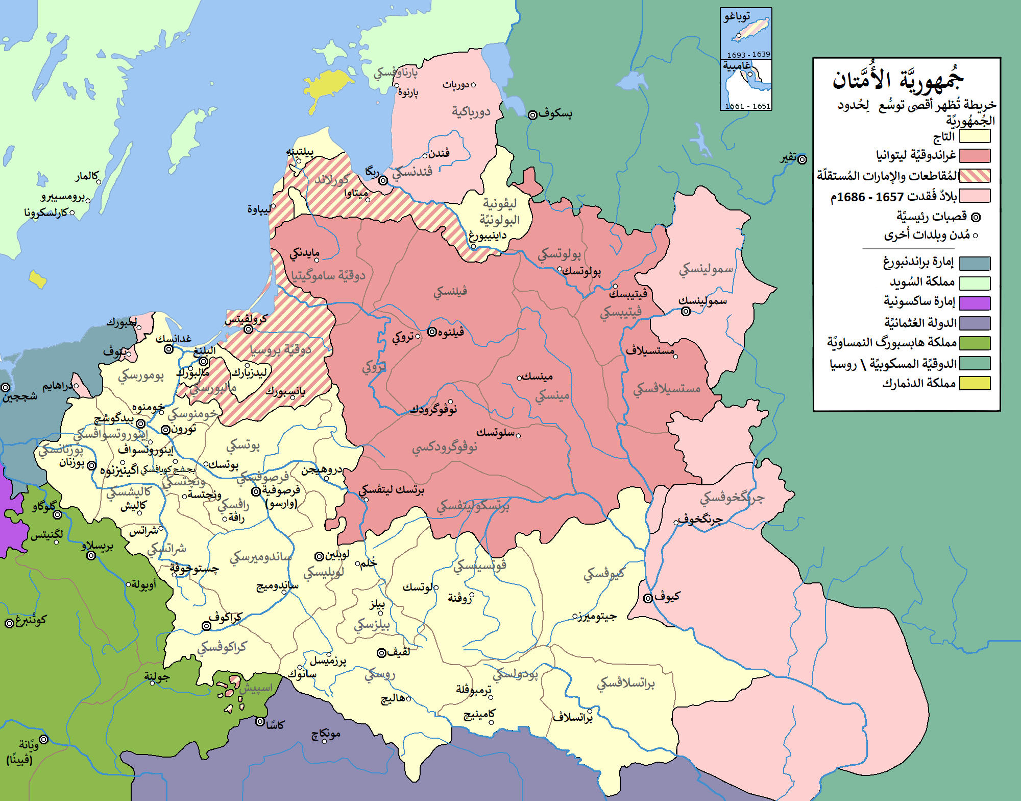 خريطة تُظهر الاتحاد البولوني الليتواني والمُقاطعات التي شكَّلت هذه الدولة وأبرز قصباتها ومُدنها وبلداتها، وما كان يُحيطُ بها من دُول.